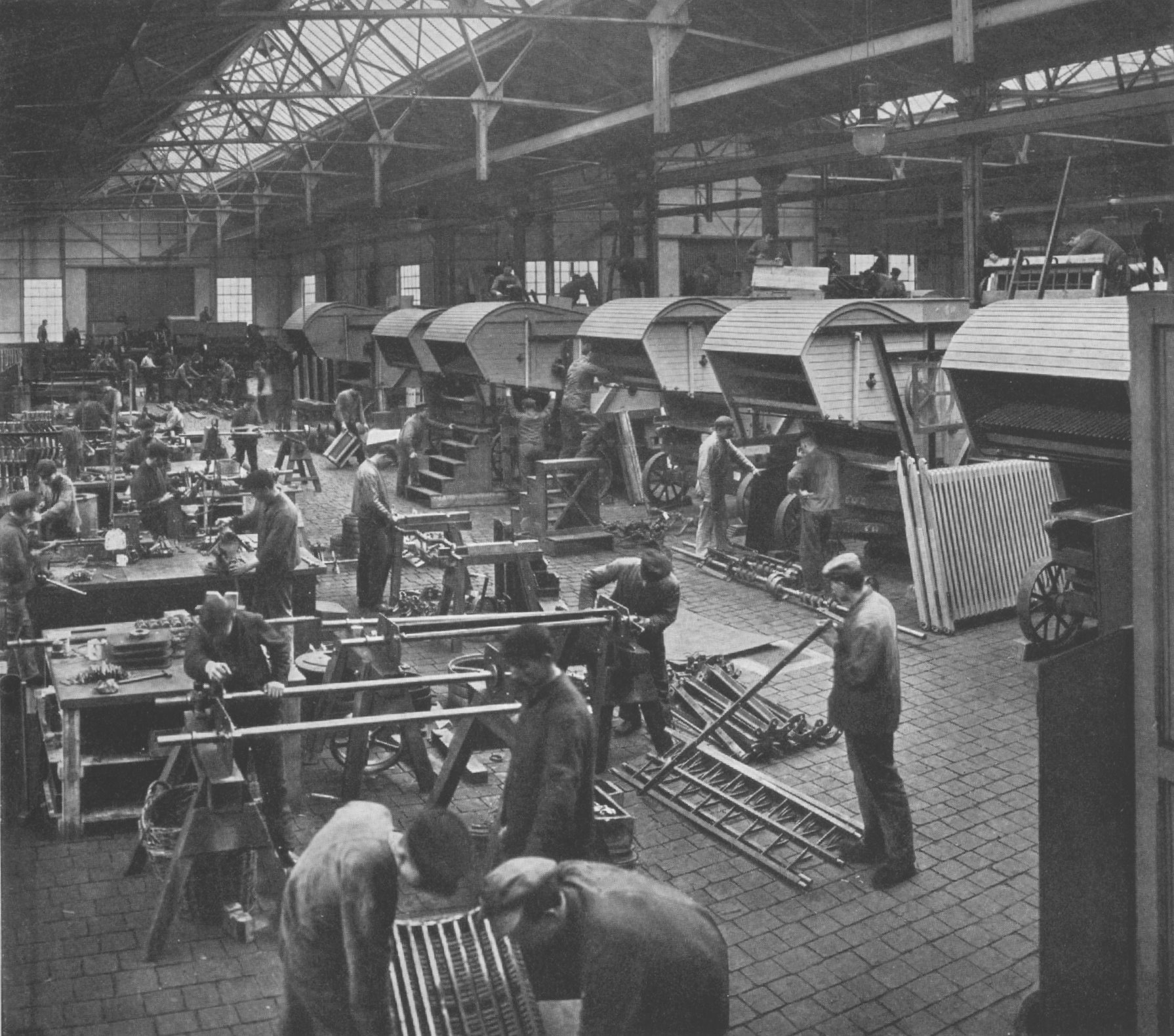 „Dreschmaschinenbau - Montagehalle“ (Originalbeschreibung); der Maschinenfabrik R. Wolf, wohl Werk Salbke